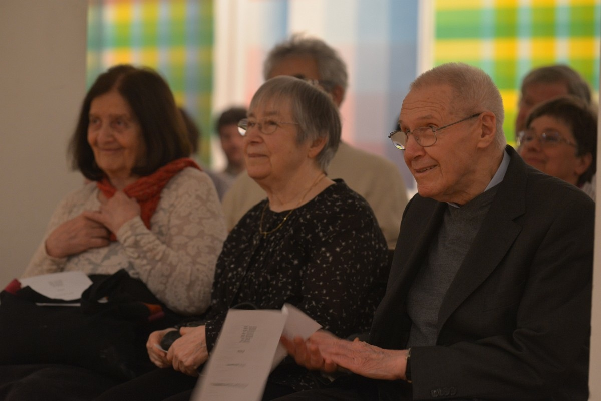 Kurtág György és Kurtág Márta koncerten, mellettük Gerlóczy Sára.